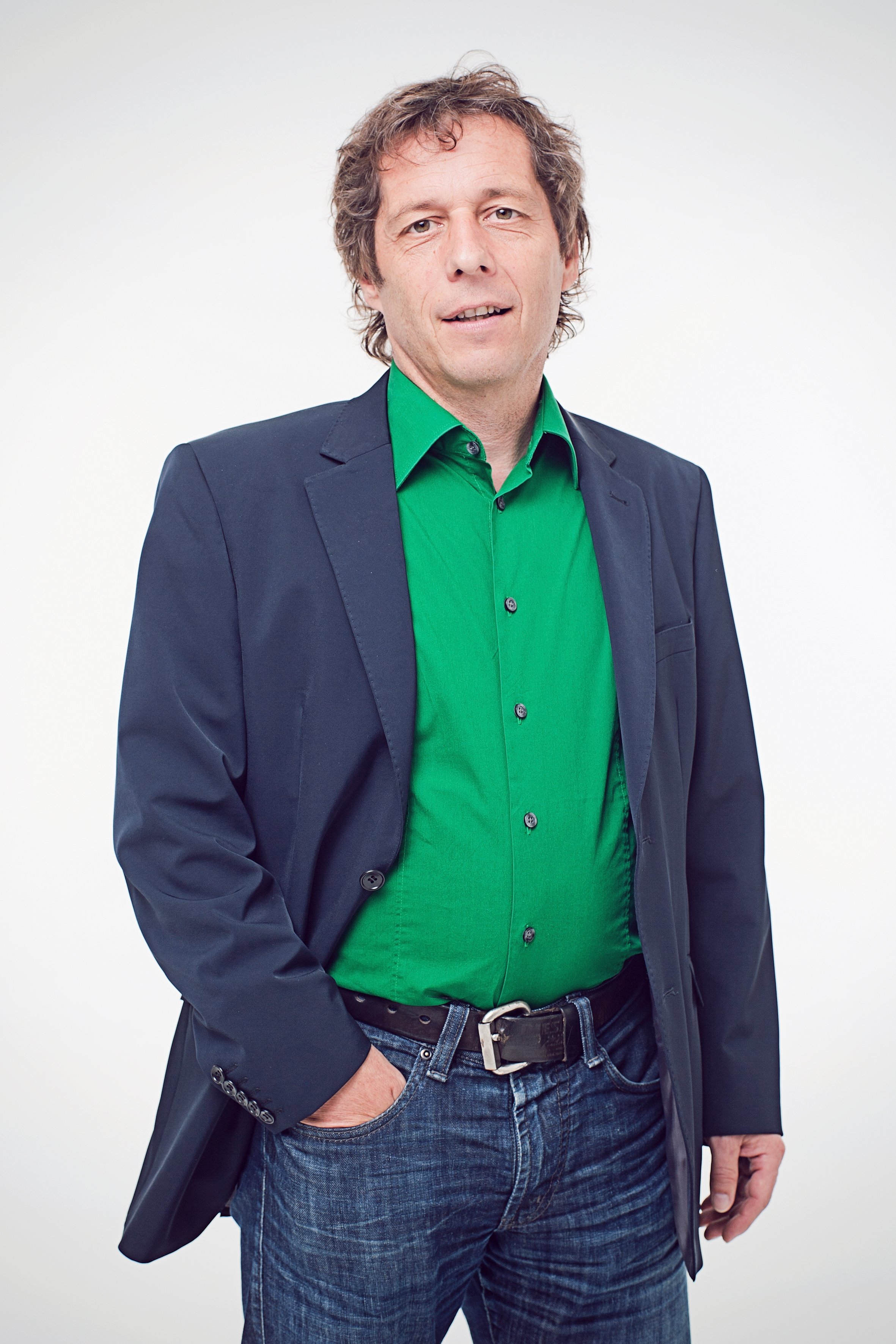 Ehemaliger Abgeordneter zum Vorarlberger Landtag Bernd Bösch